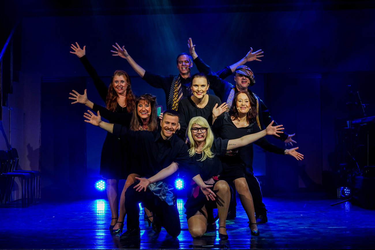 Ensemblen i revyn 2020: Skrattehöjning